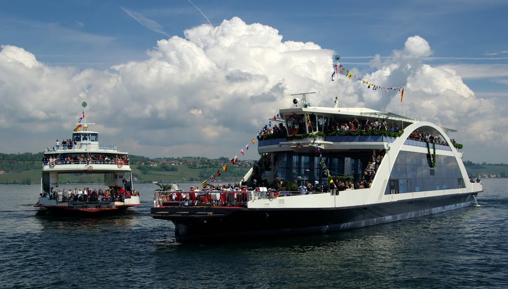 Die Lodi mit noch verhülltem Namen